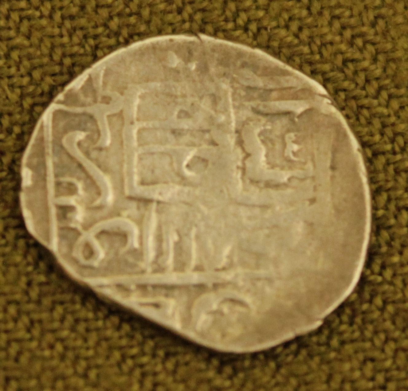 Ширваншахи, Фарух Ясар 1496 серебряная монета.